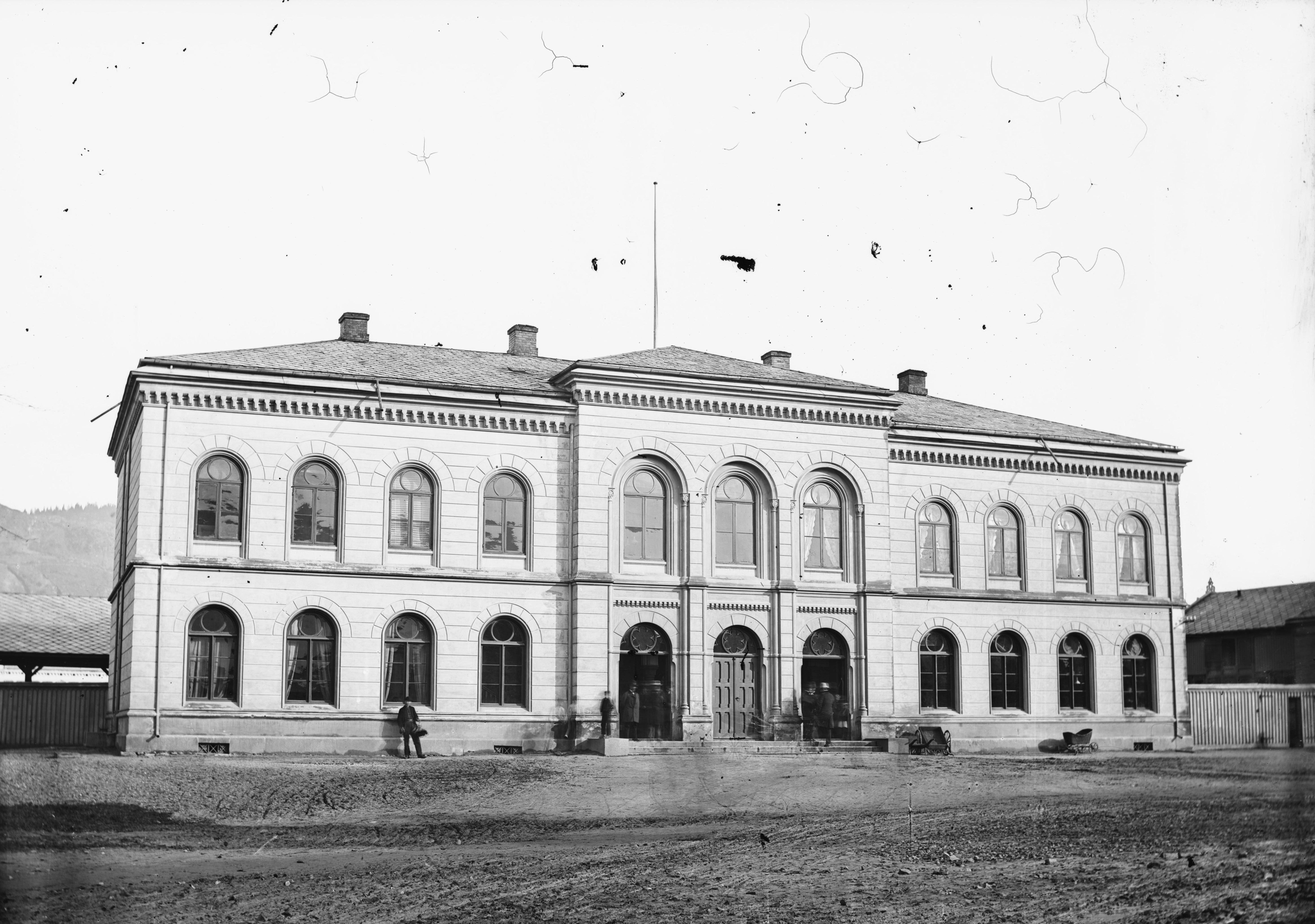 Sted: Drammen Kommune: Drammen Fylke: Buskerud Arkitekt: Georg Andreas Bull Tagger